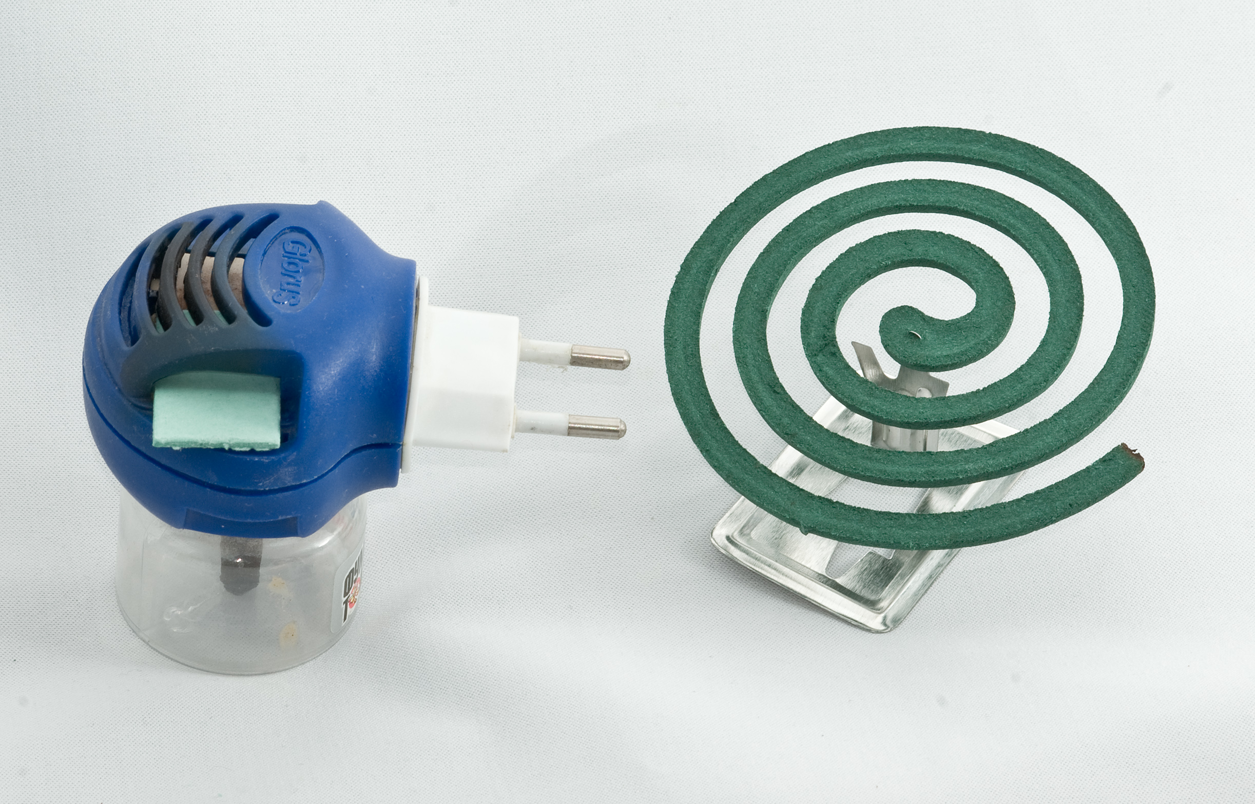 Фумигаторы (электрический и дымовой)